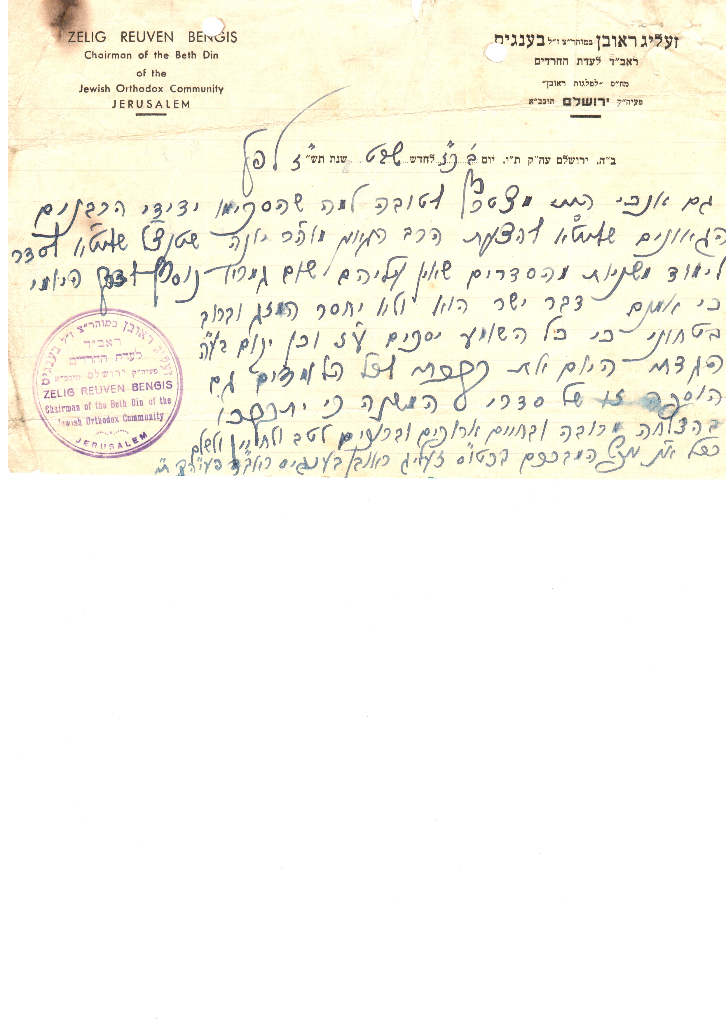 חתימת הרב בענגיס על לימודש משנה יומית